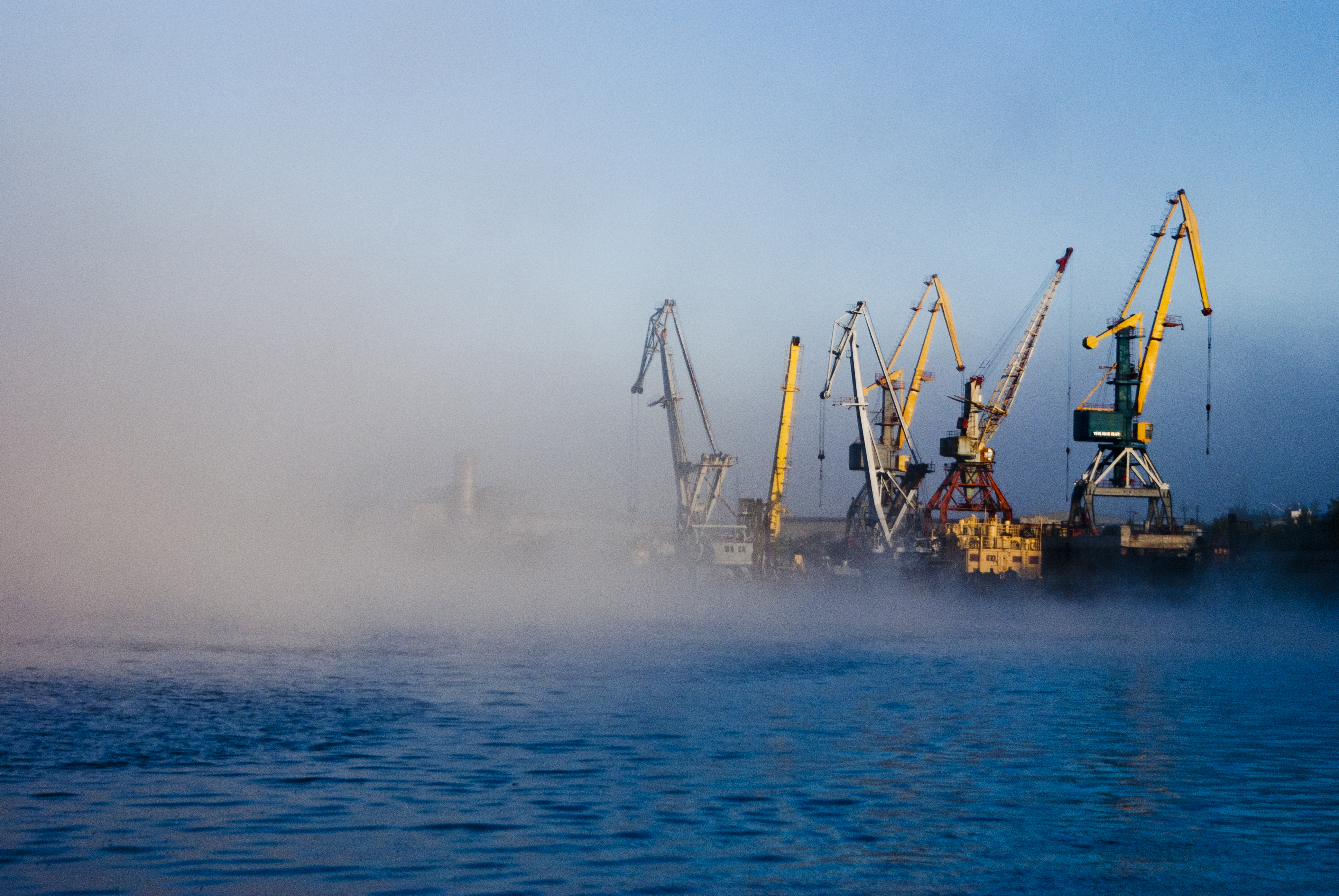 Речной_порт_Нефтеюганска